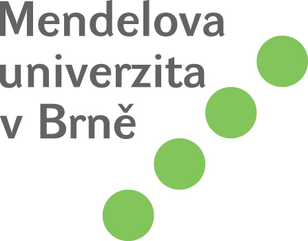 logo Mendelu